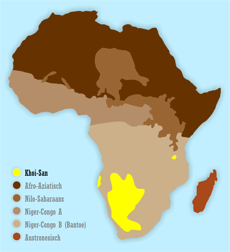 Kaart die een indruk geeft van de verspreiding van de Khoi-Santalen in Afrika. Bronnen: zie nl::en:Image:African language families.png. Gemaakt door Mark Dingemanse. Vrijgegeven onder de Creative Commons Naamsvermelding 2.0 licentie